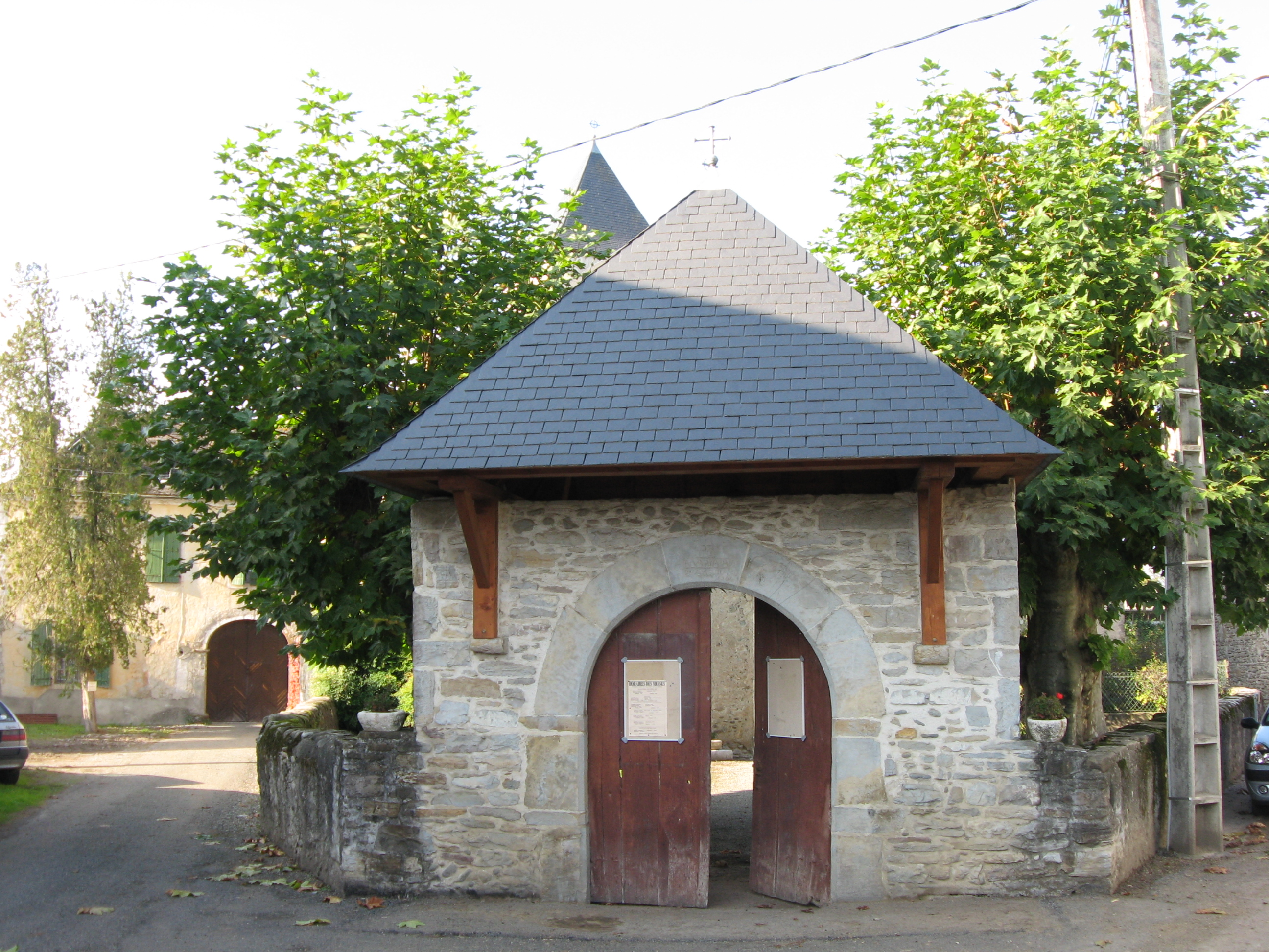 Vue de l'entrée de l'enceinte de l'église de Verdets (Pyrénées Atlantiques) Pyrénées).